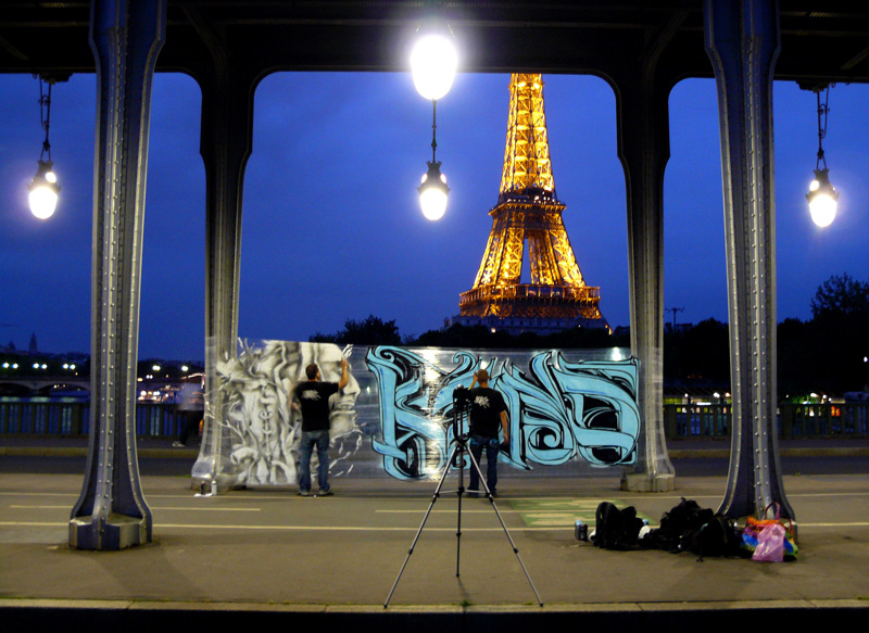 Astro & Kanos les inventeurs du concept de CelloGraff